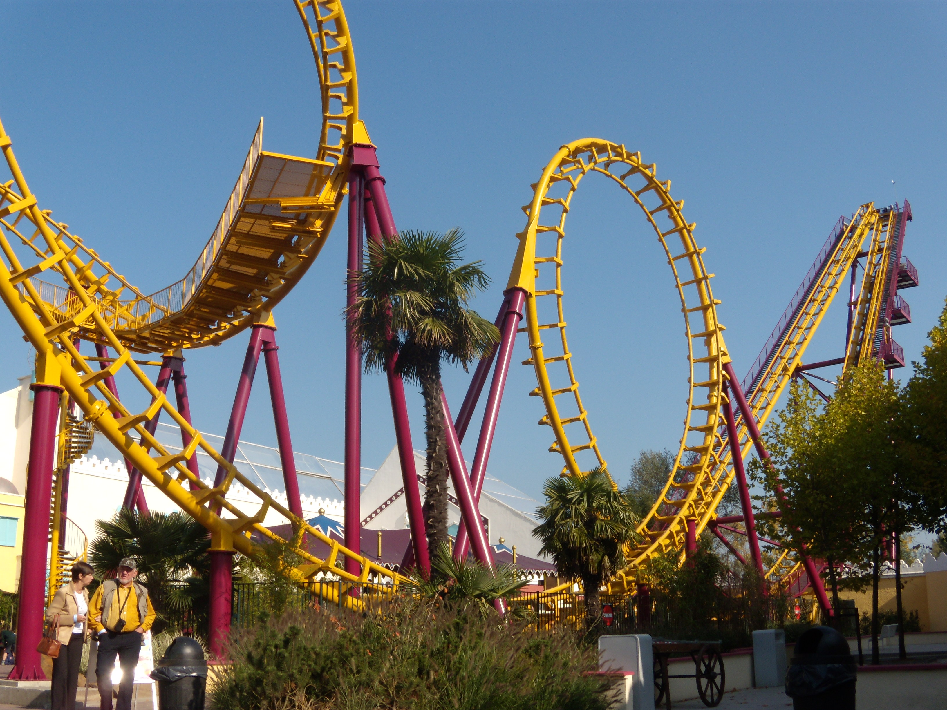 Cobra, Montagnes russes navette de Vekoma à Walibi Belgium.